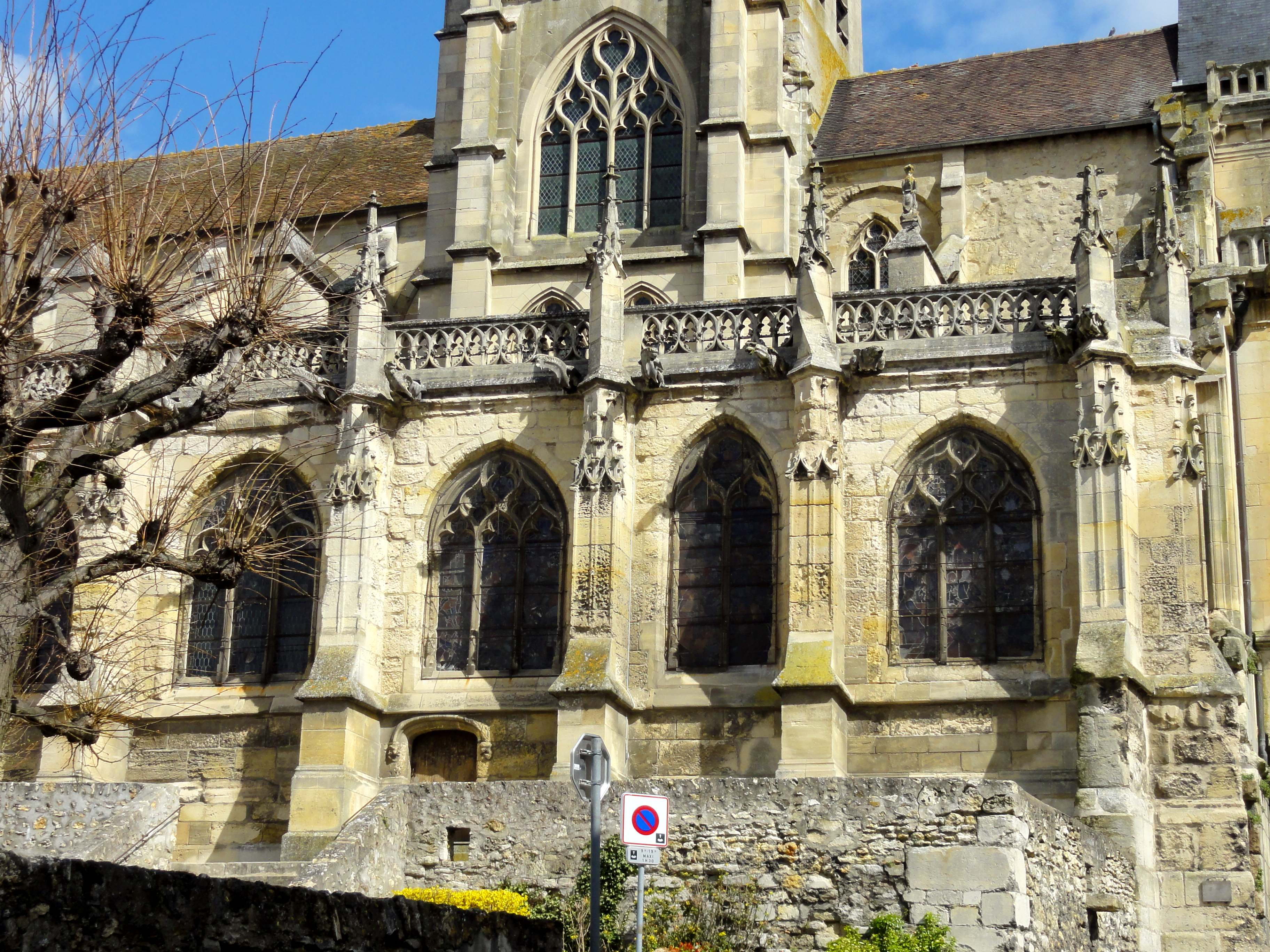 Église Saint-Martin - voir titre.